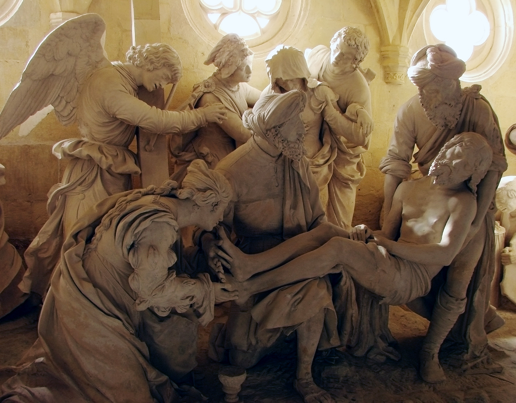 Mise au Tombeau (ou Saint Sépulcre) par Ligier Richier. Eglise Saint-Etienne à Saint-Mihiel.